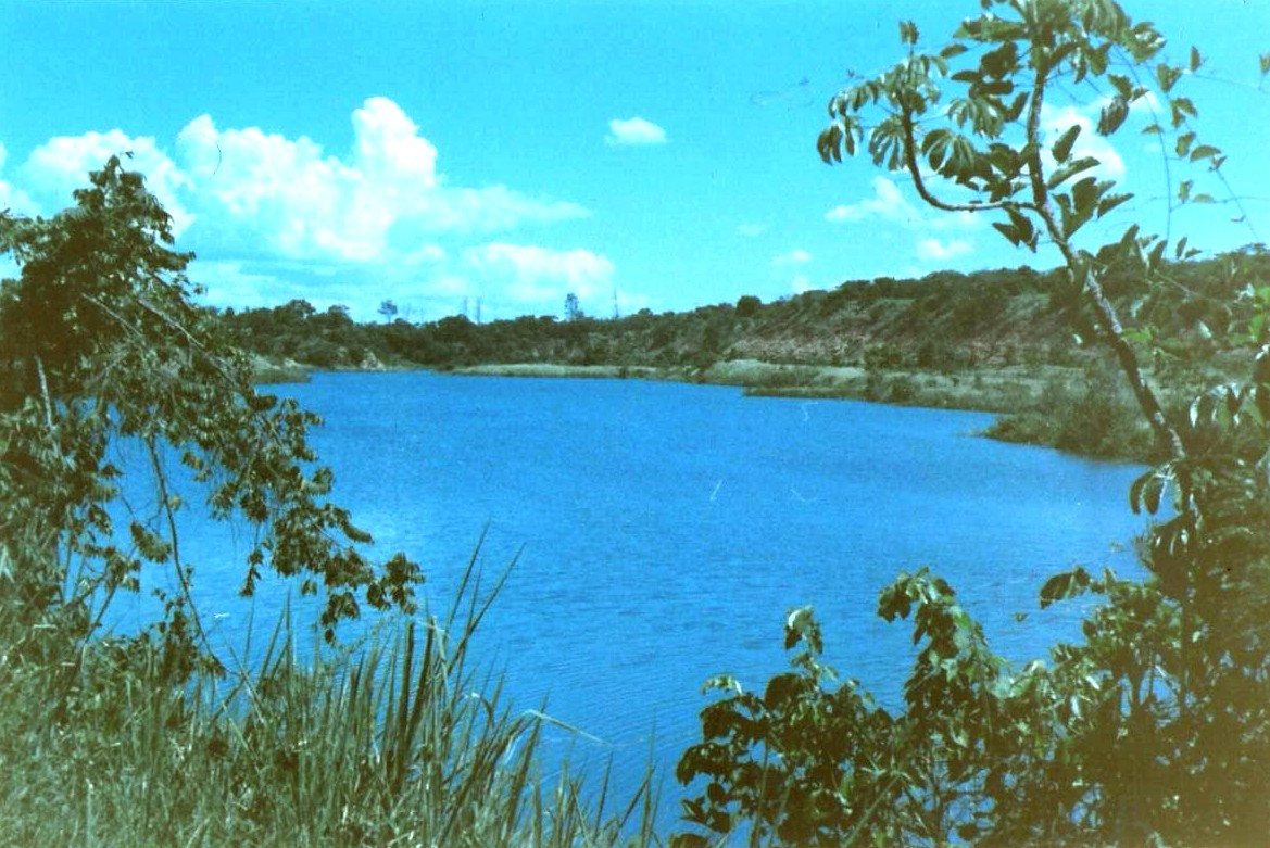 Descrição: A Cascalheira, em Três Lagoas, Mato Grosso do Sul, Brasil. 2007.